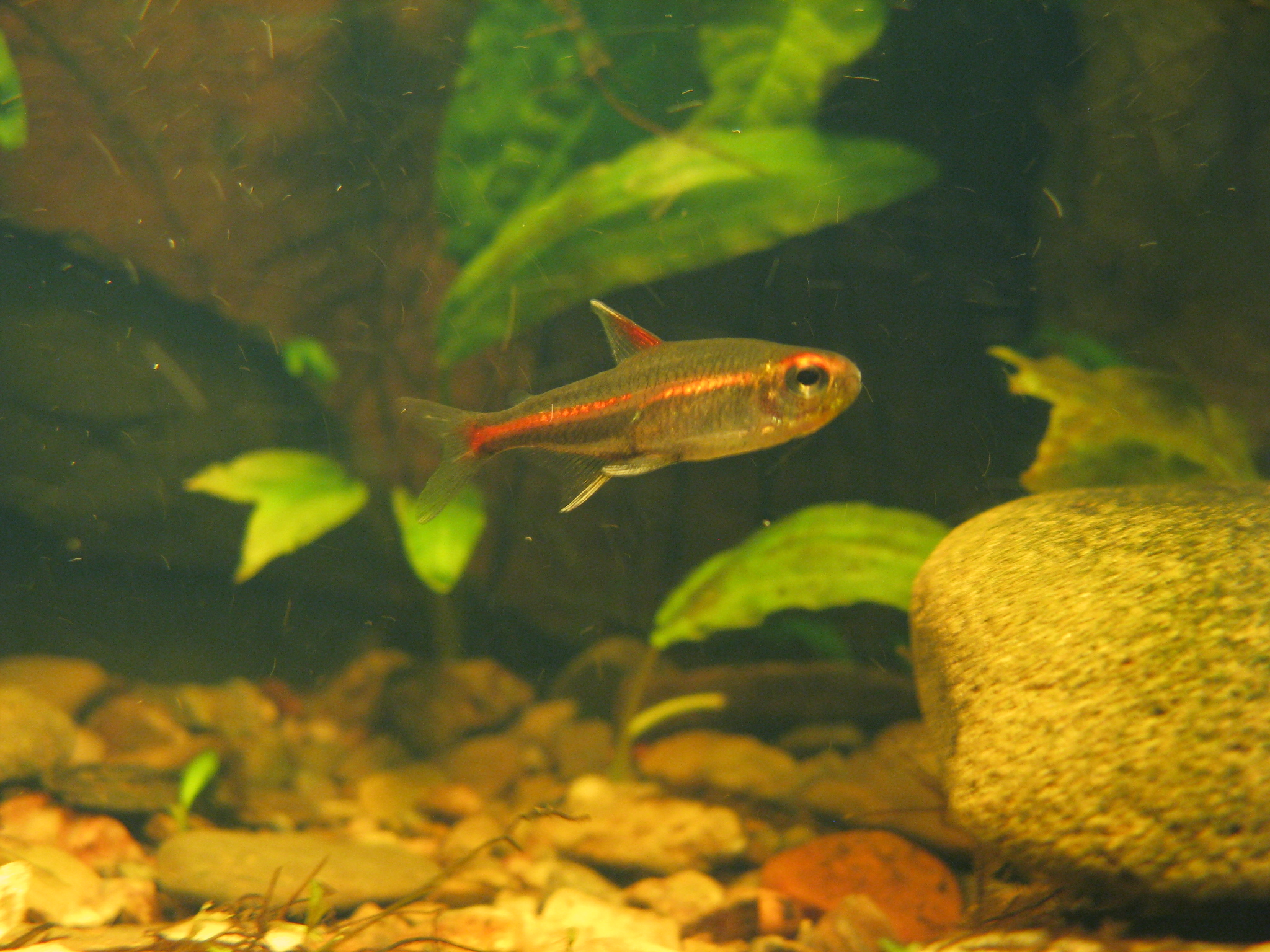 Česky: Tetra žhavá